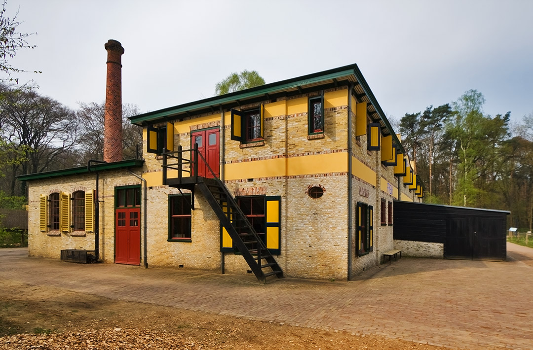 Stoomzuivelfabriek Freia te Veenwouden, gemeente Dantumadeel ,1908, 7.1 Wiki loves art /NL